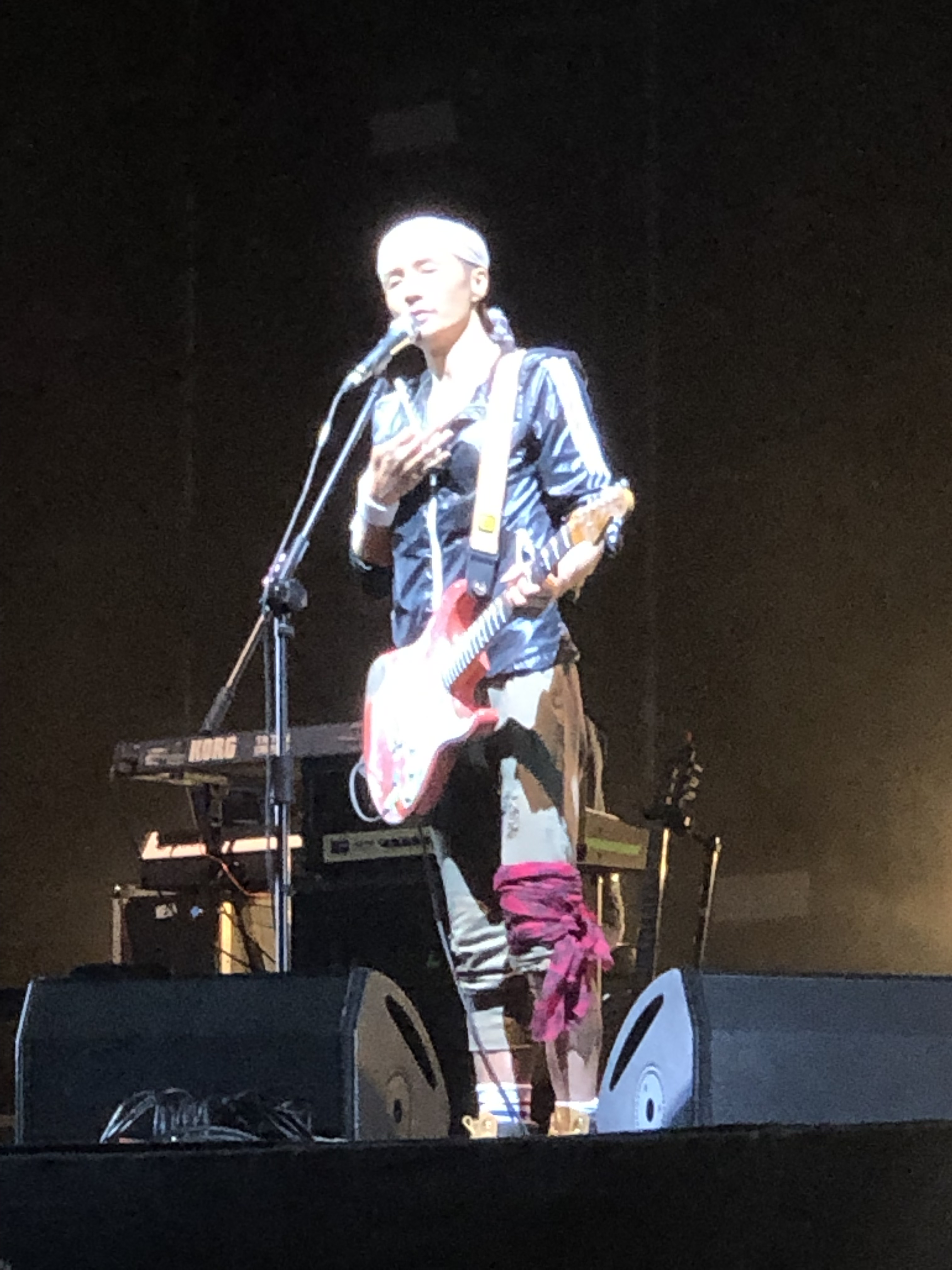 中文（中国大陆）: 朴树2019太湖迷笛音乐节